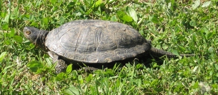 Gorghi Tondi (TP) - Sicily